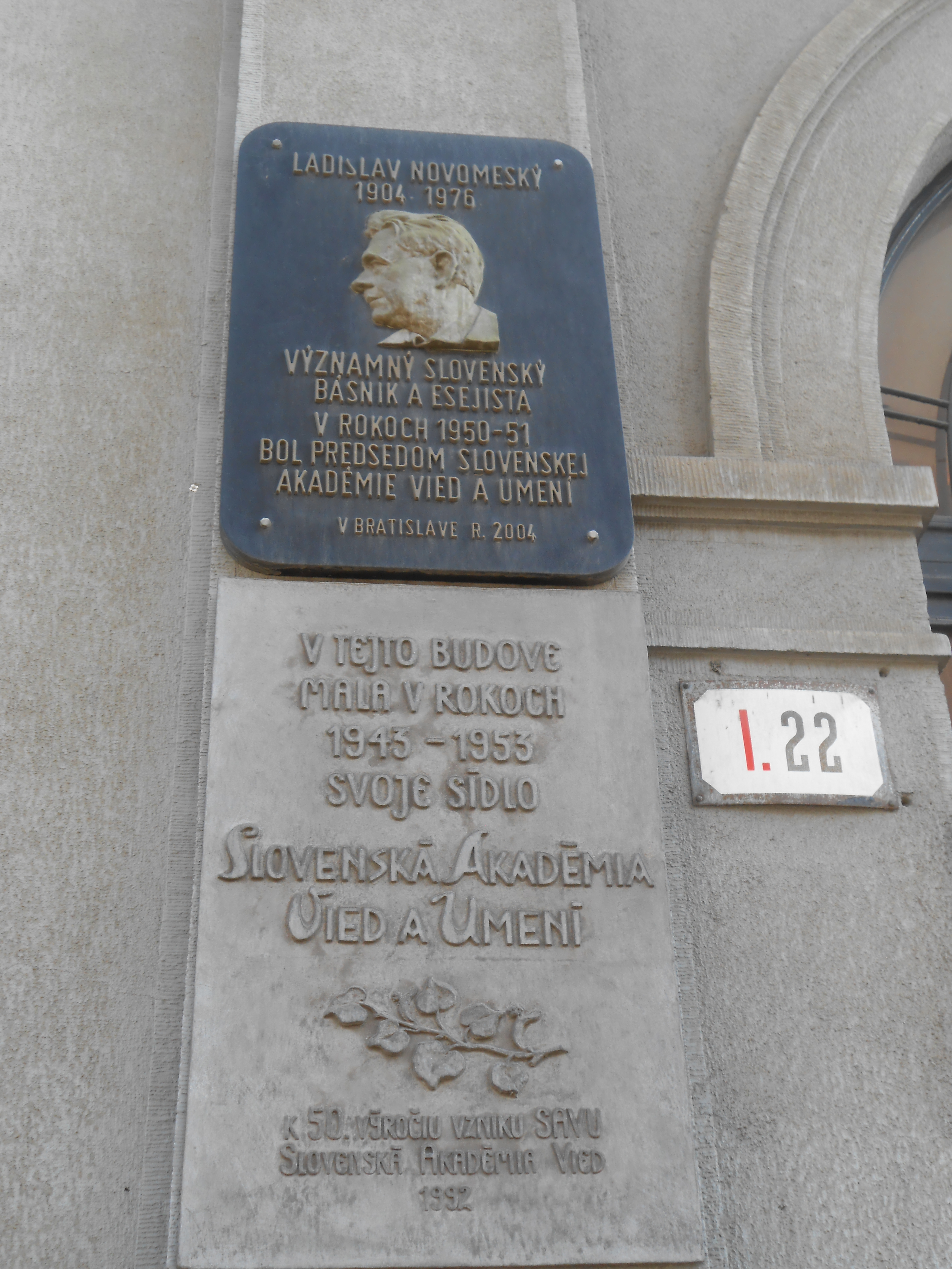 Pamätná tabuľa Slovenskej akadémie vied a umení, ktorá pôsobila v rokoch 1943-1953 v priestoroch dnešnej budovy UK v Bratislave; pamätná tabuľa Laca Novomeského, ktorý v budove pôsobil v rokoch 1950-51